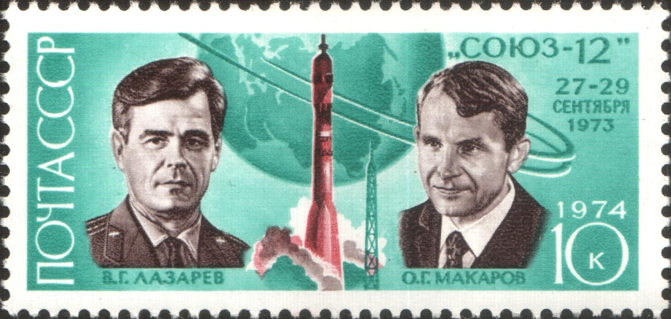 USSR stamp, "Soyuz-12", 1973. Lazarev & Makarov. Марка СССР, Полёт космонавтов В. Г. Лазарев и О. Г. Макарова на космическом корабле "Союз-12", 1973, 10 коп.